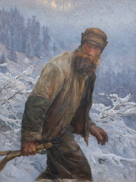 Le Braconnier ("The Poacher")